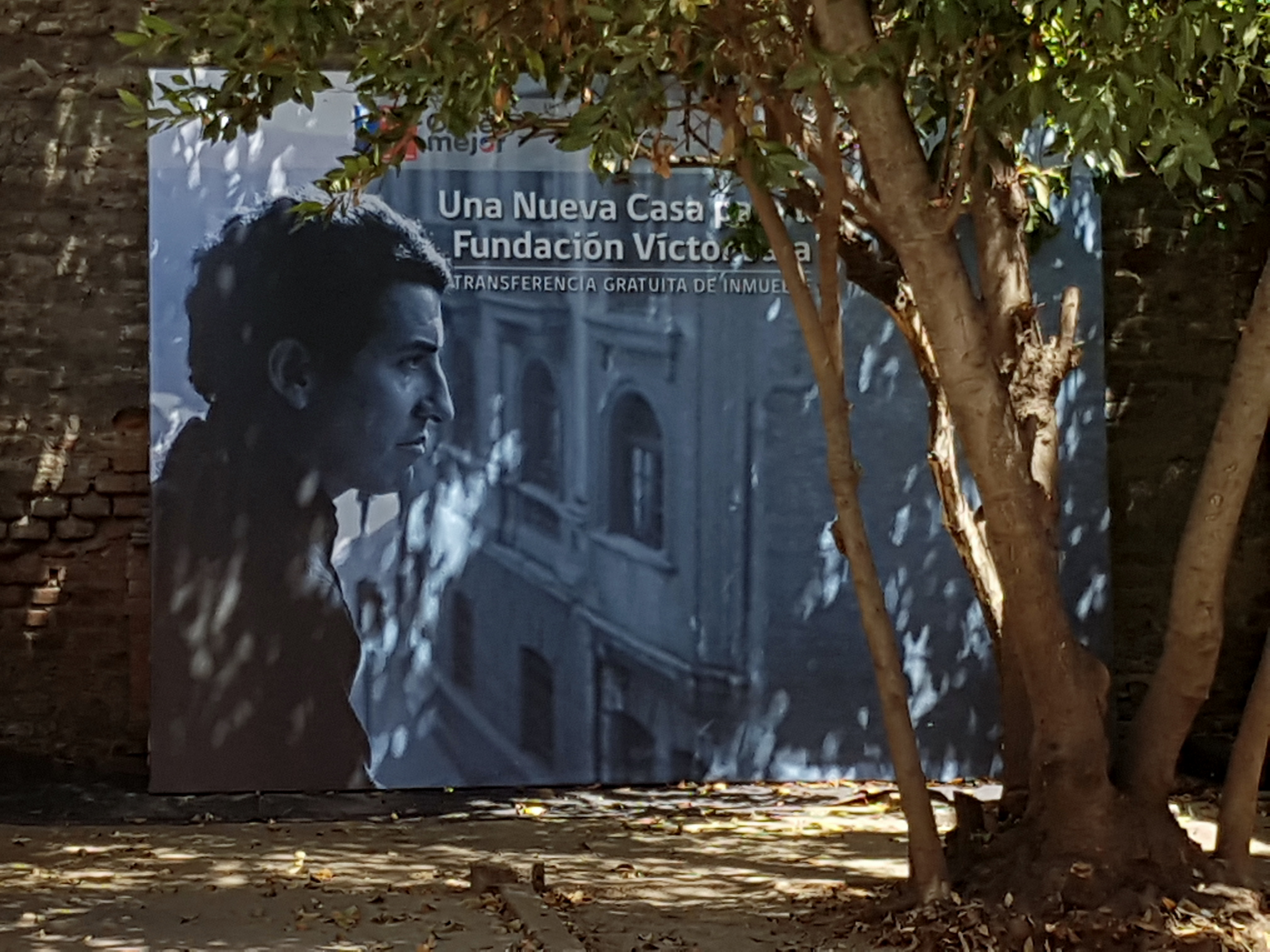 Sede de la Fundación Víctor Jara, calle Almirante Riveros 067, entre las avenidas Bustamante y Vicuña Mackenna; comuna de Providencia, Santiago de Chile.